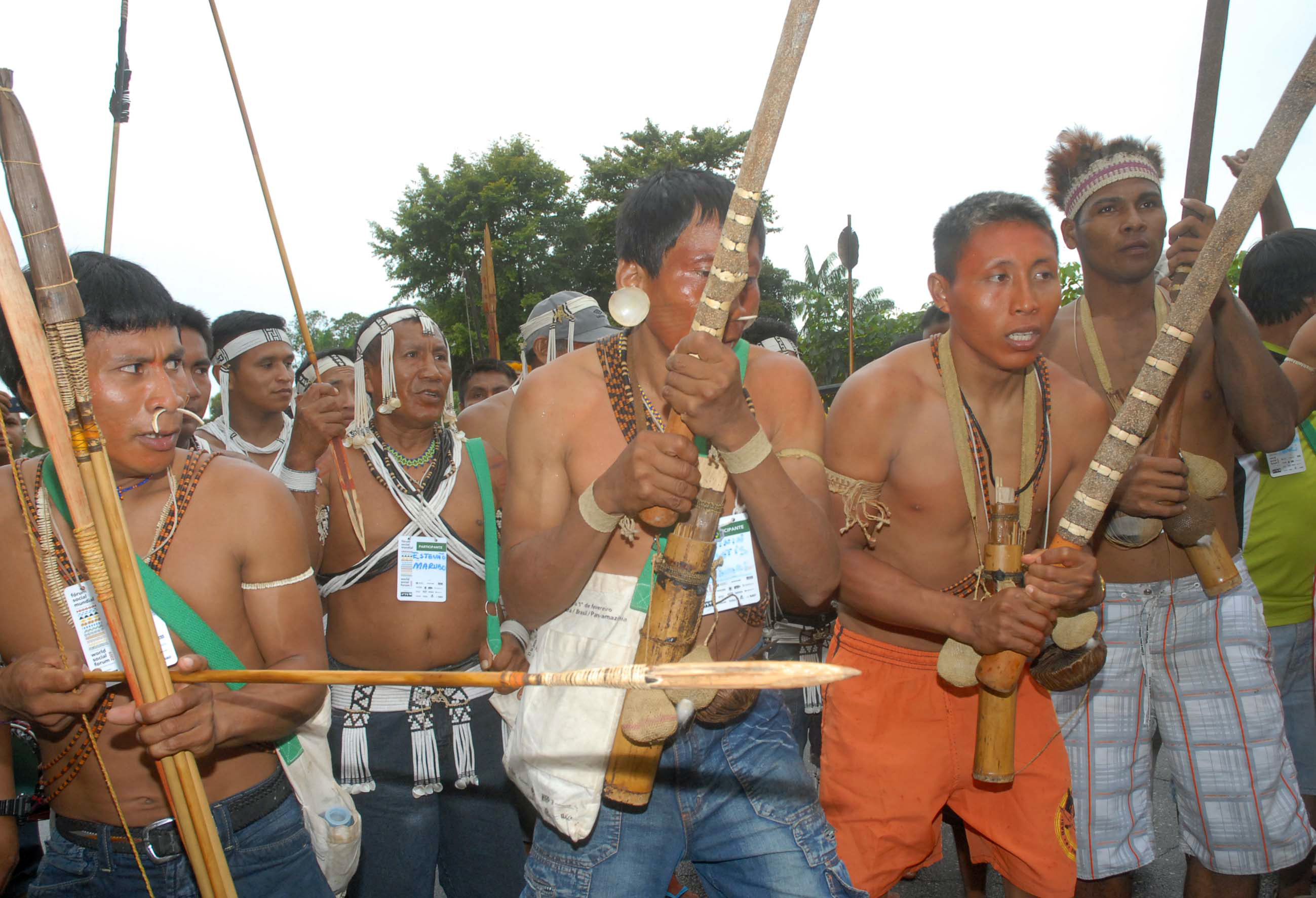 Belém - Indios de diversas etnias do Vale do Javarí fazem protesto e invadem a tenda Revolução Cubana e o Centro de Imprensa do FSM pedindo mais saúde e denunciando que vários de suas tribos morreram de hepatite nos últimos anos